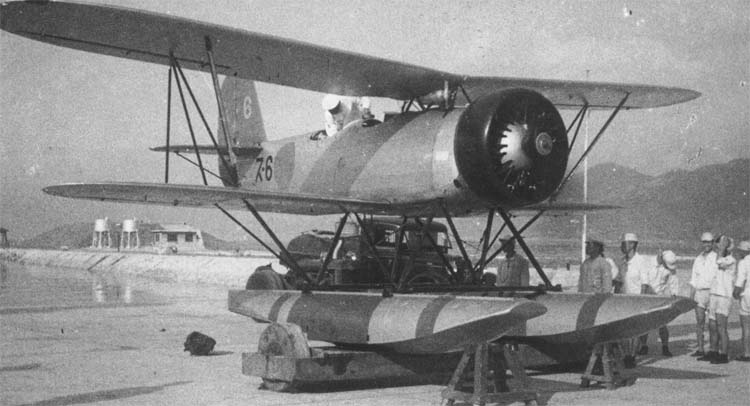 九六式小型水上機